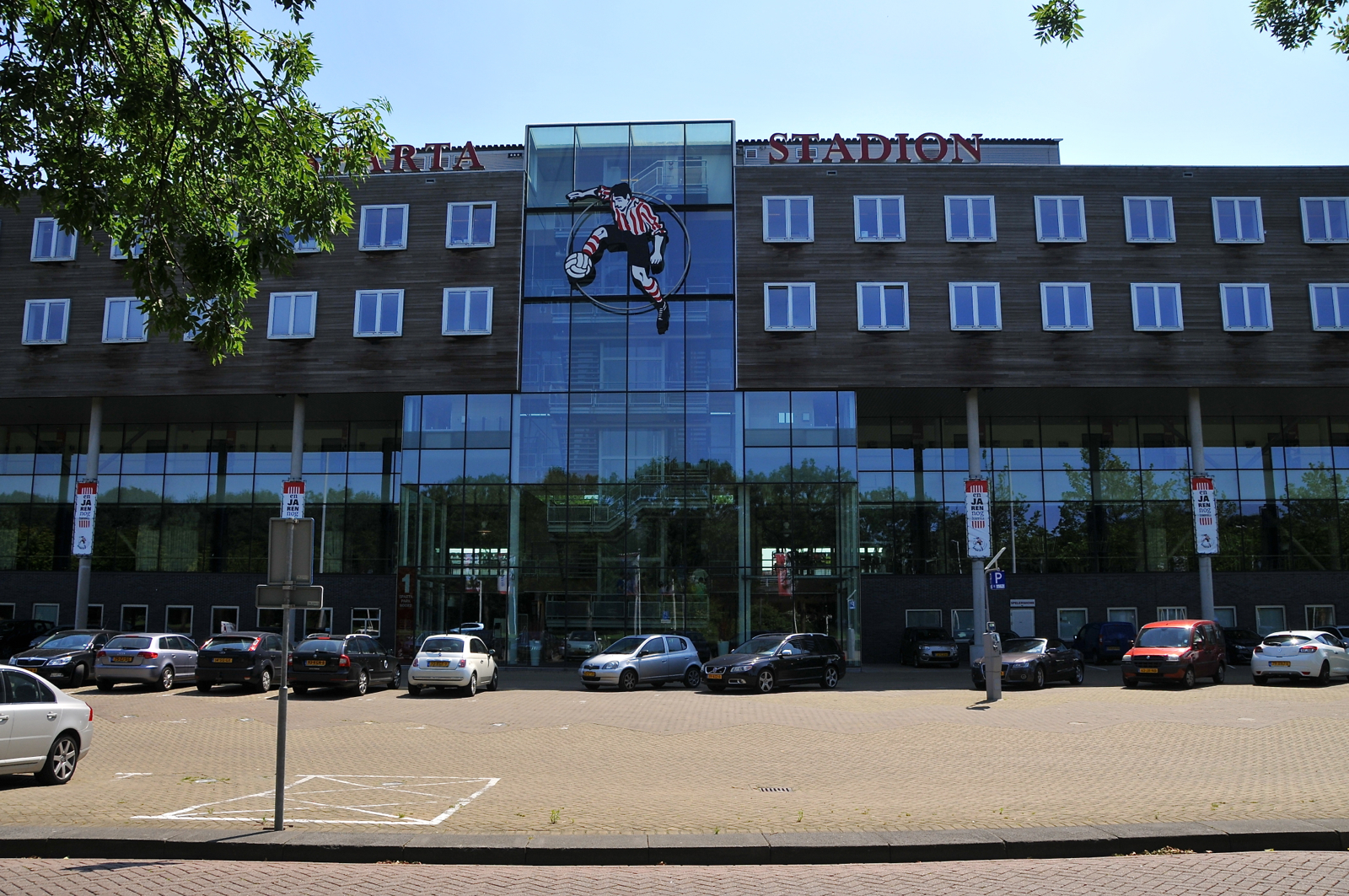 De nieuwe hoofdingang sinds 1999, het veld werd een kwartslag gedraaid. Spangen is een wijk in Rotterdam, in de deelgemeente Delfshaven. Midden in Spangen staat het oudste voetbalstadion van Nederland, het Kasteel van Sparta uit 1916. Dit stadion werd in 1999 volledig gerenoveerd en staat nu officieel bekend als het Sparta-Stadion Het Kasteel.